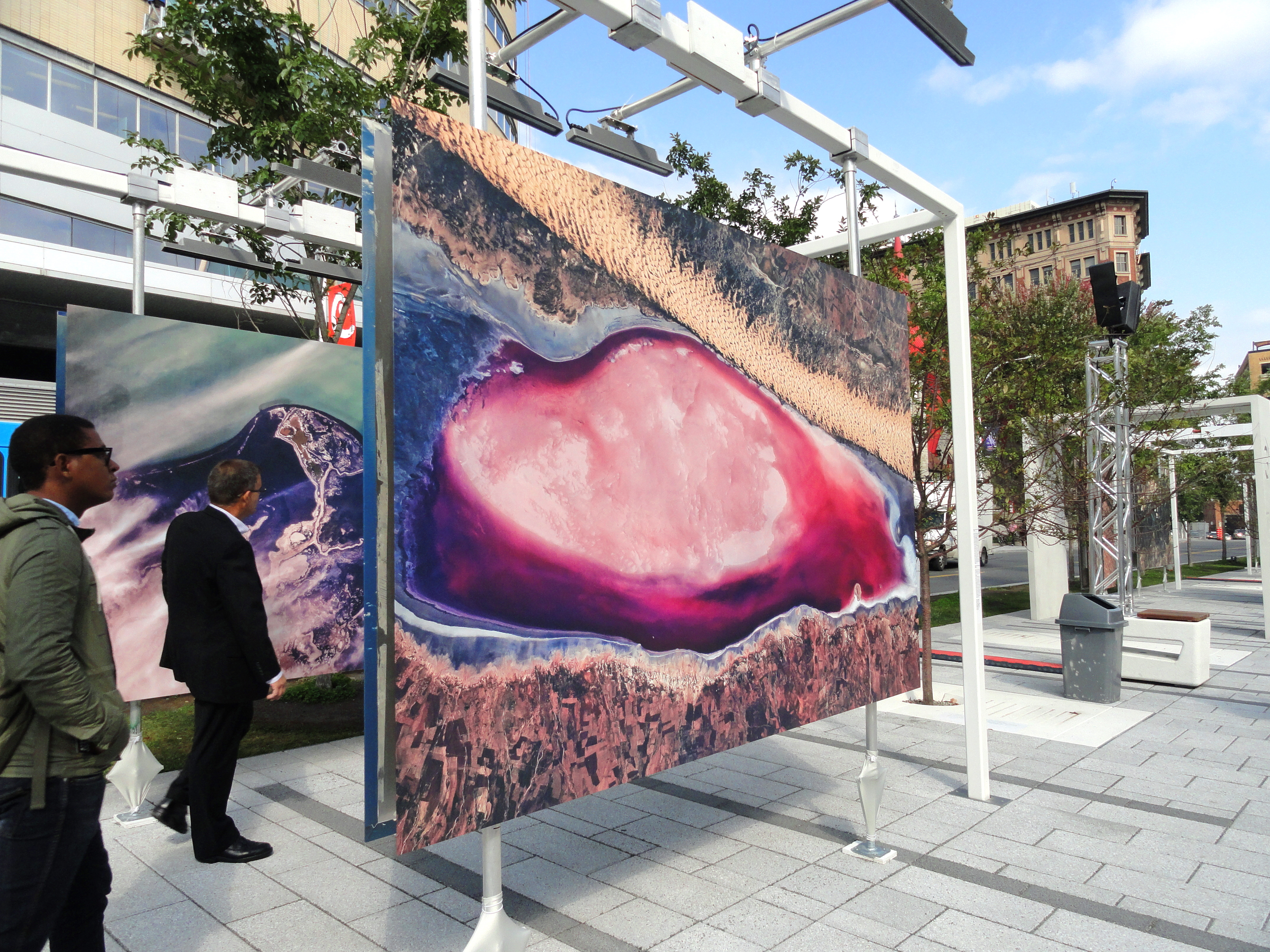 GAÏA, le plus récent projet de Guy Laliberté, fait suite à sa Mission sociale et poétique, réalisée en 2009 durant son voyage de onze jours dans l’espace à bord de la Station spatiale internationale. Premier explorateur privé de l’espace à publier et à exposer les photographies de son voyage, Guy Laliberté nous offre avec GAÏA d’incroyables photos de la Terre – sortes d’œuvres d’art naturelles – qui révèlent notre planète sous une perspective éblouissante et foncièrement optimiste.